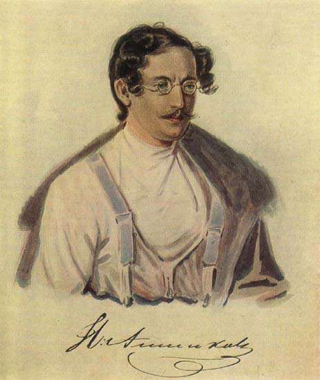 Акварельный портрет декабриста И. А. Анненкова, написанный Н. А. Бестужевым в Сибири в 1836 г.